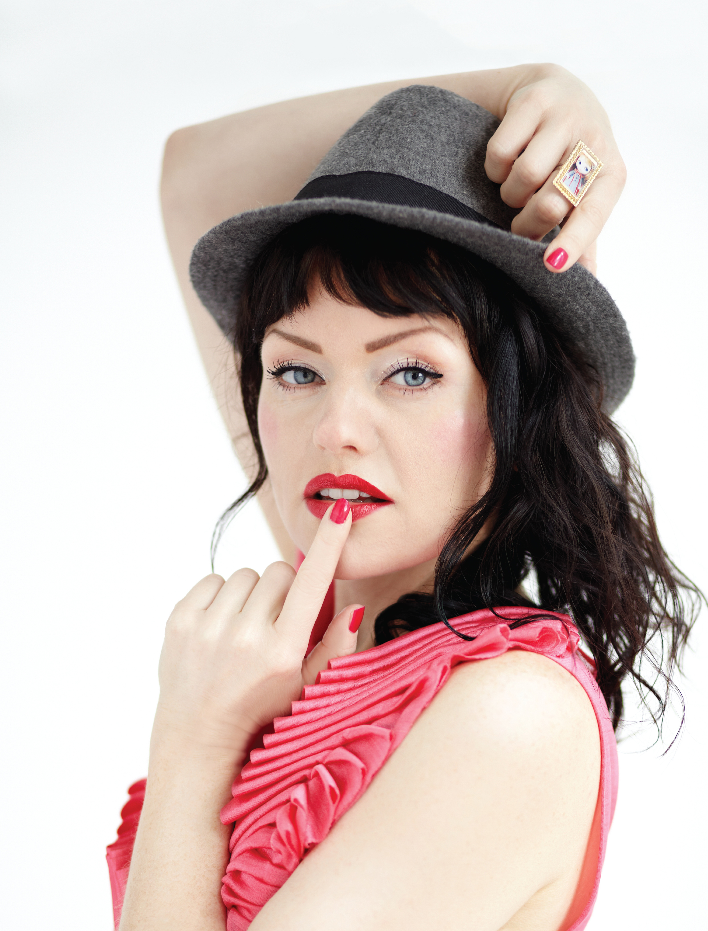 Jenny Lane is een Nederlandse zangeres.